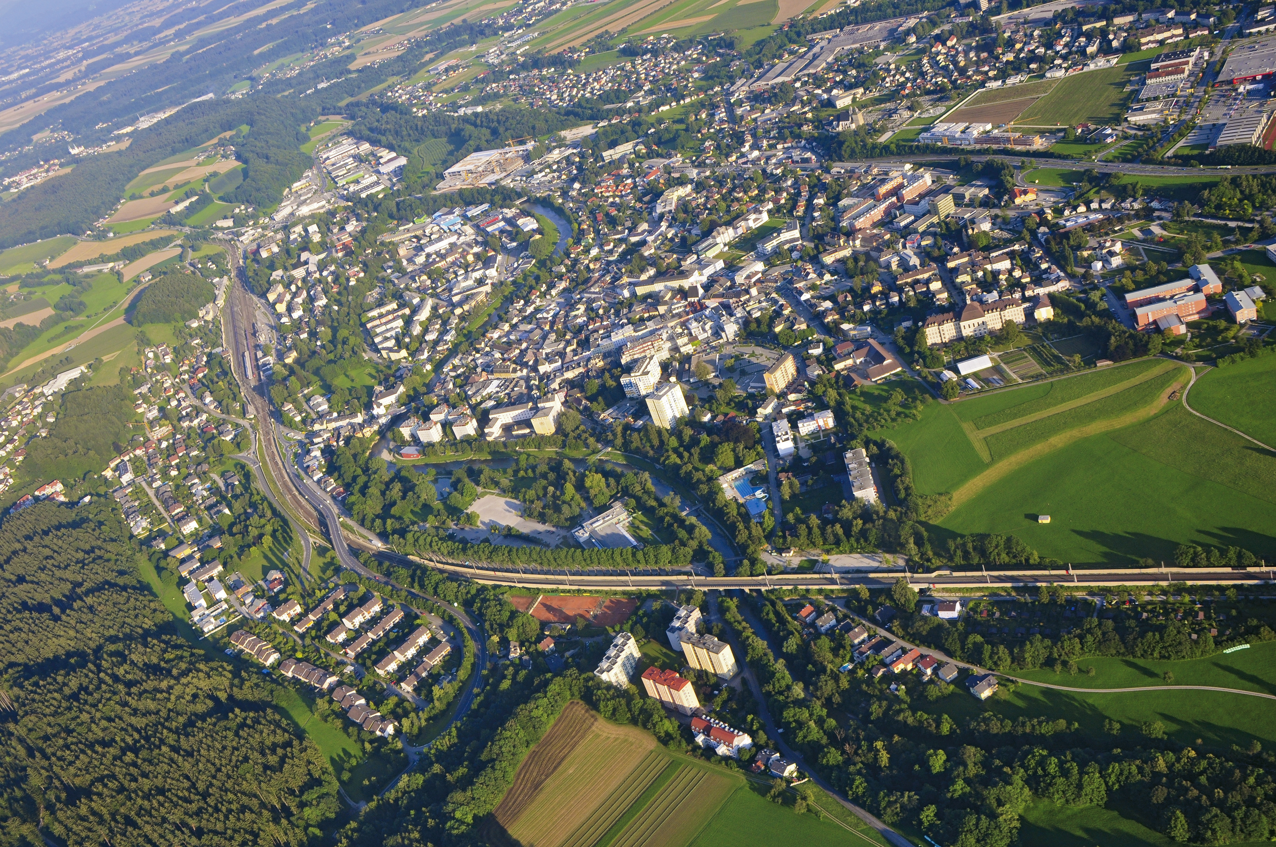 Vöcklabruck aus der Vogelperspektive